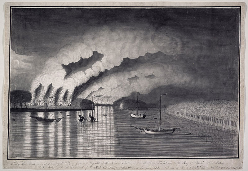 Rycina Thomasa Daviesa z 1758r. Przedstawia najazd wrogich armii brytyjskich na ziemię Akadyjczyków.